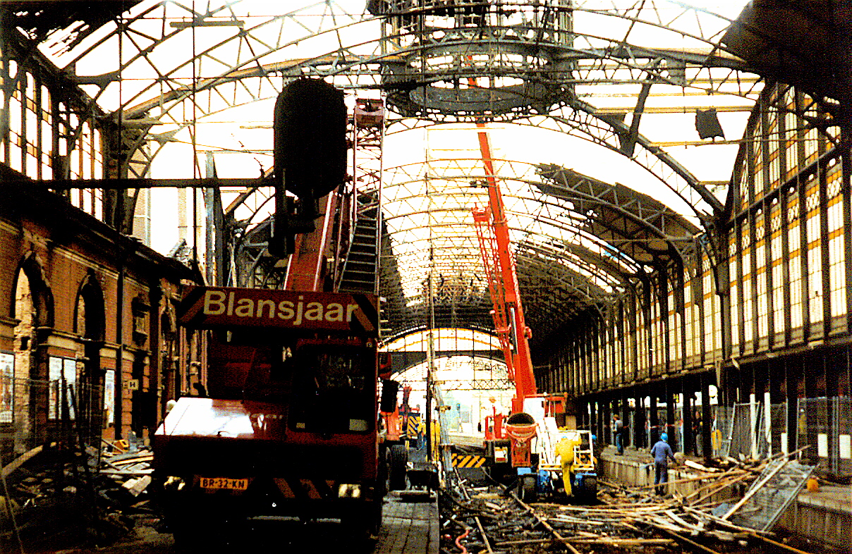 Hollands Spoor na een felle brand in oktober 1989 waarbij het gehele middendeel uitbrandde